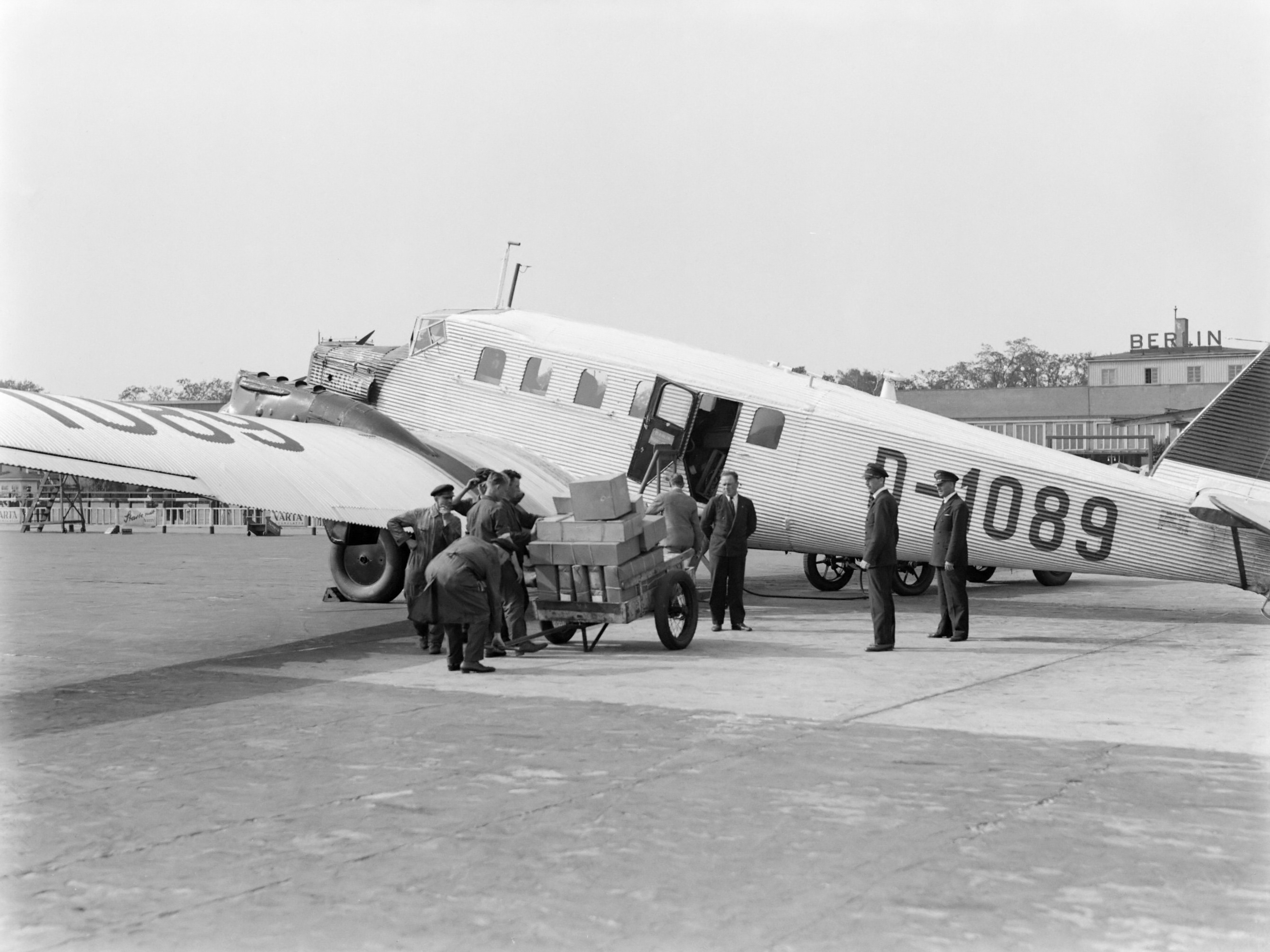 Vliegveld Berlijn - Tempelhof: Kar met een lading pakketten bij de Junkers G24 D-1089 Hestia die voor de lufthansa de lijndienst Berlijn - Warschau onderhoudt oktober 1934